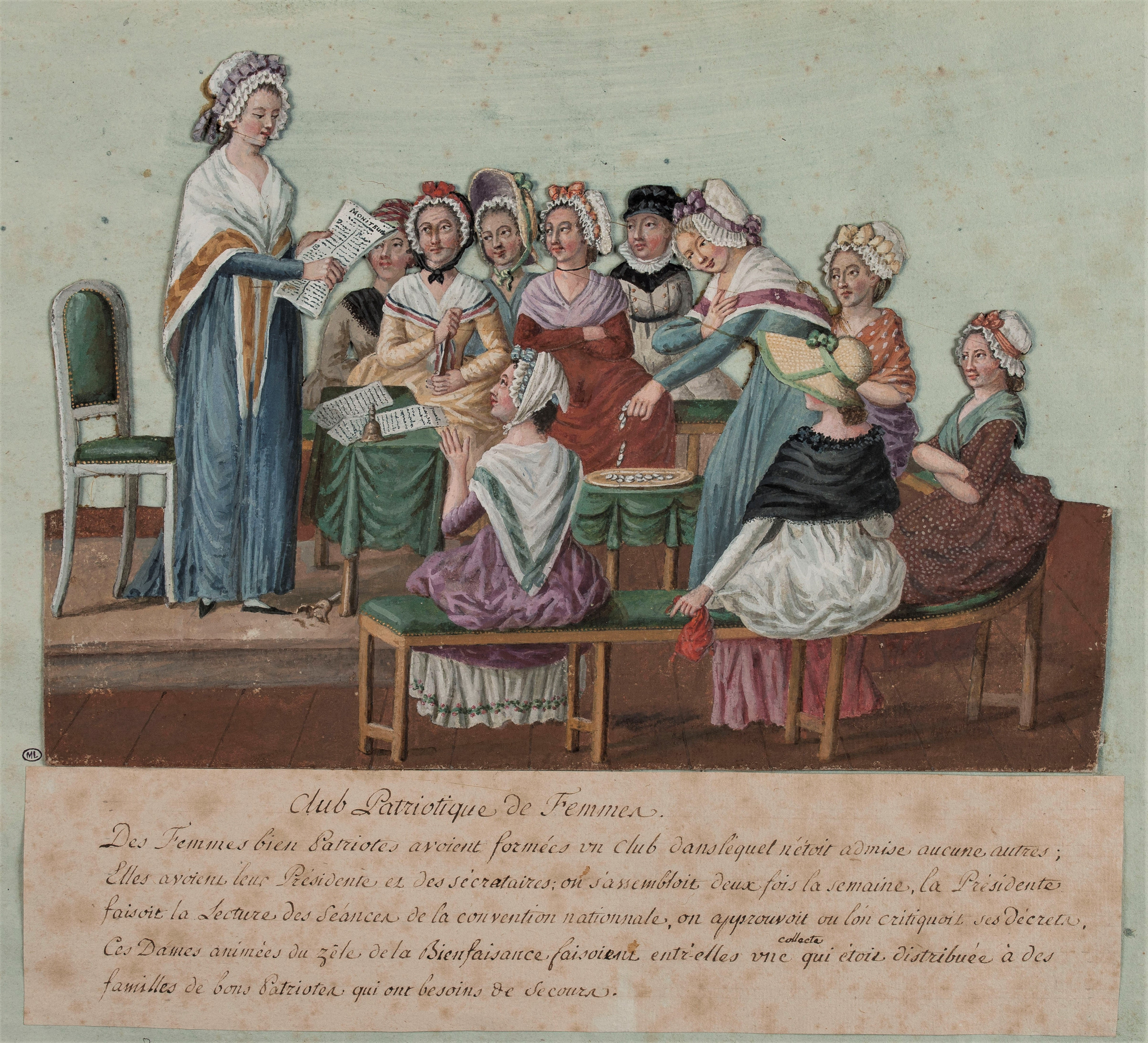 Représentation d'un club féminin sous la Révolution française.